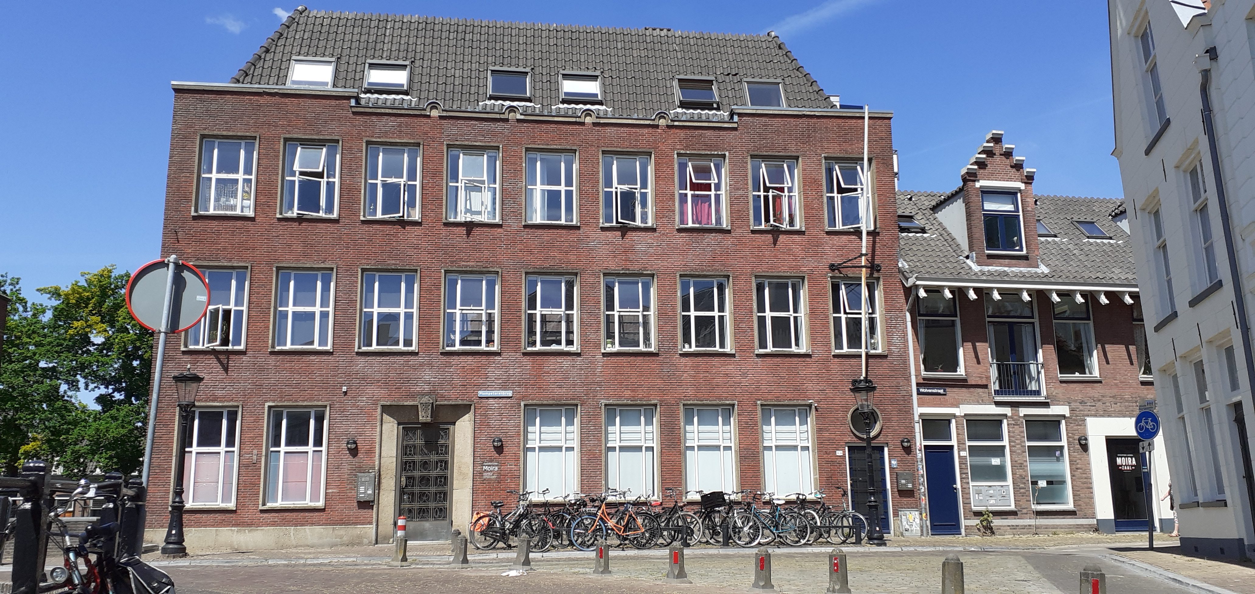 Het Moira complex in Utrecht